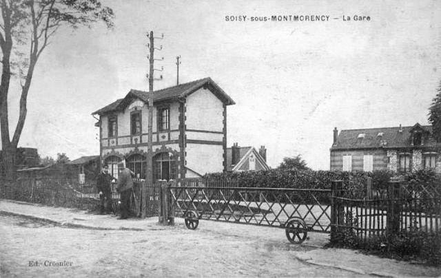 La gare de Soisy-sous-Montmorency ; ligne du Refoulon, début du XXe siècle.